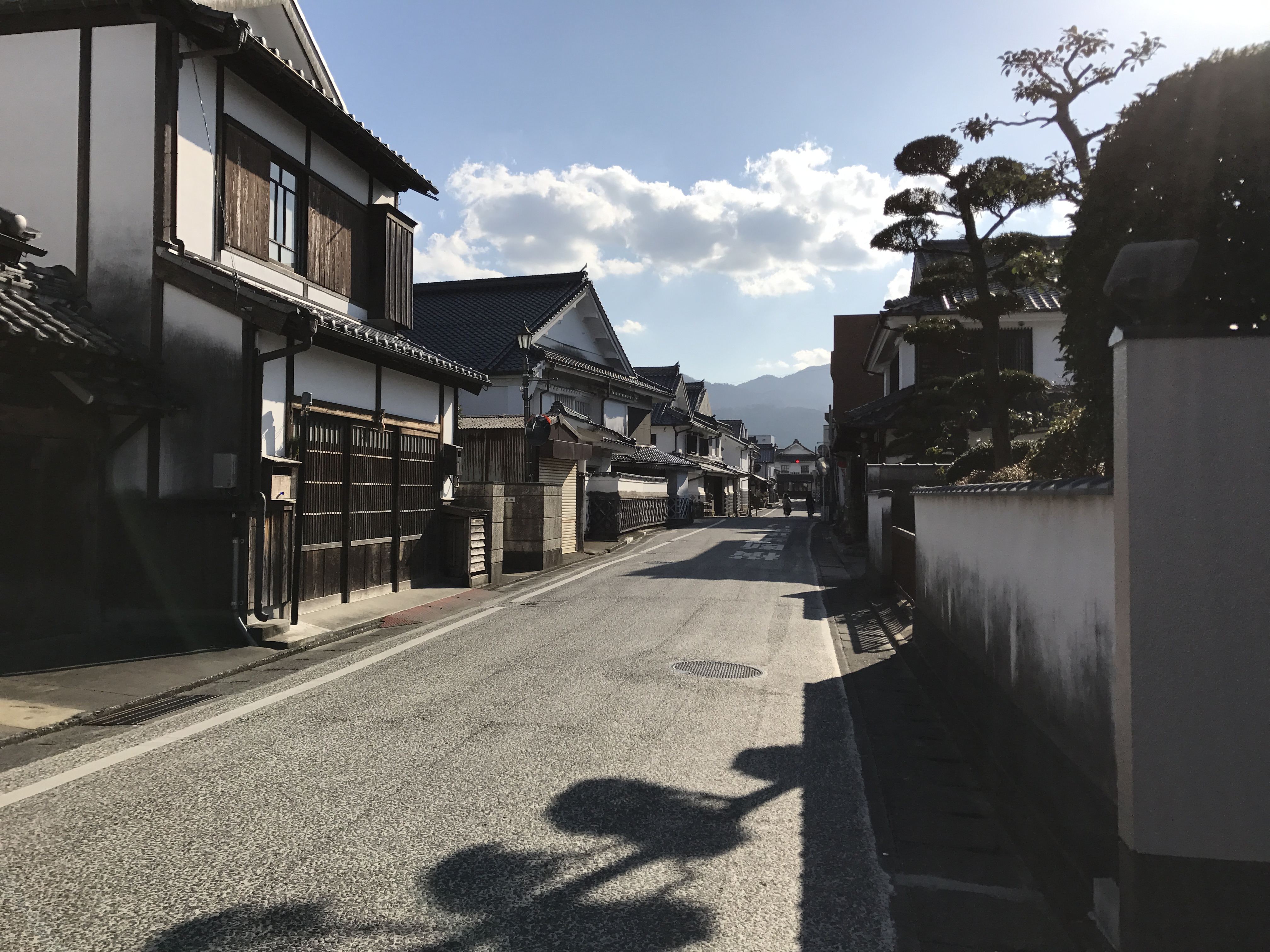 筑後吉井・白壁通り